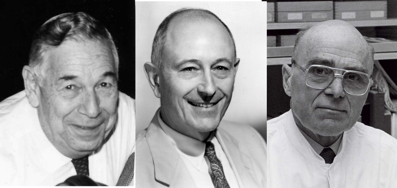 E. Mayer, docteur vétérinaire ( Israël), Jacques Espinasse (1937-1996), professeur de pathologie bovine à l'École nationale vétérinaire de Toulouse et M. Stober professeur de pathologie bovine à la Faculté vétérinaire de Hanovre (Allemagne) : triumvirat de la Société mondiale de Buiatrie dans les années 1980. Association des anciens élèves et amis de l’École nationale vétérinaire de Toulouse (AEA ENVT)